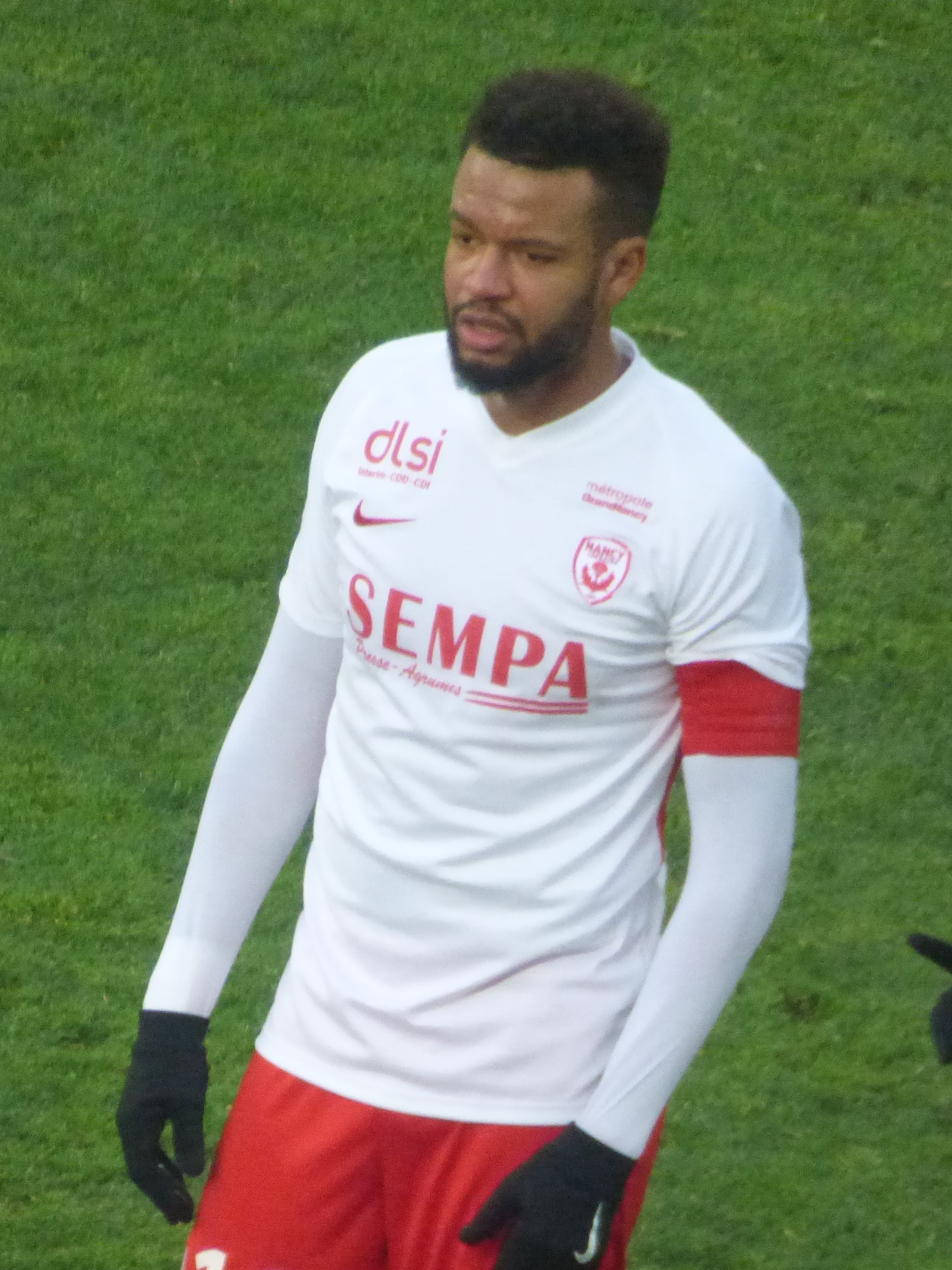 Nicolas Saint-Ruf, avec le brassard de capitaine, lors du match RC Lens / AS Nancy-Lorraine, comptant pour la vingt-et-unième journée du championnat de France de football de Ligue 2 2018-2019, le 19 janvier 2019, au Stade Bollaert-Delelis de Lens.